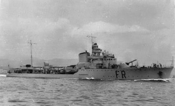 Il cacciatorpediniere Freccia in una vecchia cartolina